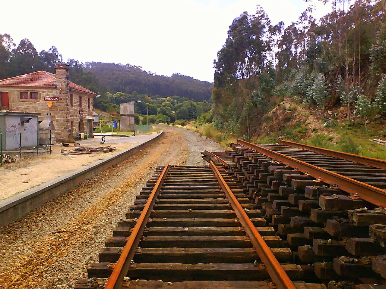 Estación de ferrocarril de Bregua, parroquia de Veiga, concello de Culleredo, de la línea A Coruña-Vigo